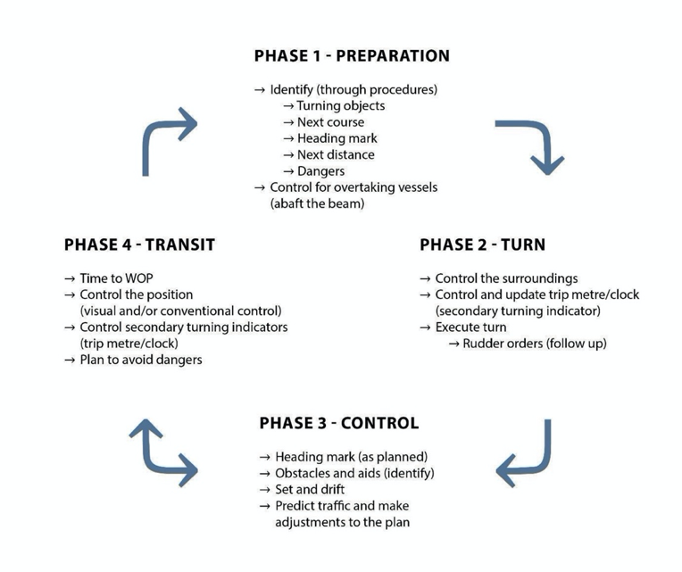 Figuren viser de fire kontinuerlig rullende fasene i navigasjon: Forberedelsesfasen, turnfasen, kontrollfasen og transittfasen (Hareide 2019)